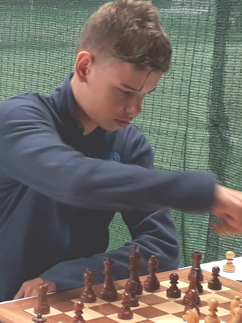 Endre Csiki, Runde 4 Mitropa Cup 2019 in Radenci.